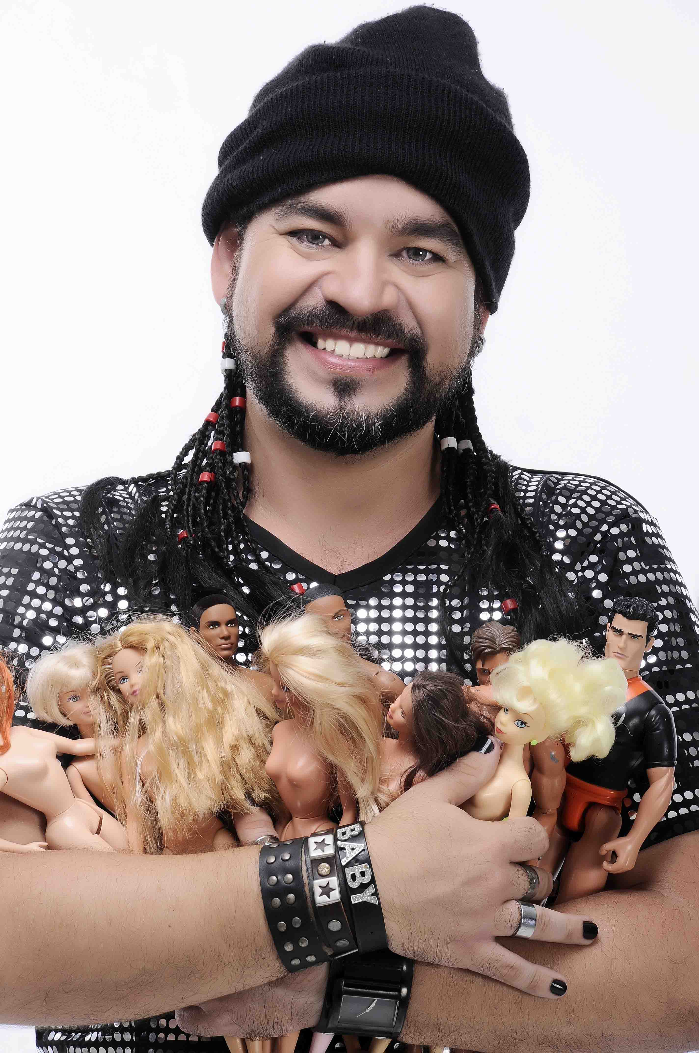 Marcus Baby em ensaio fotográfico de Dayse Barreto para o livro "HITS!"